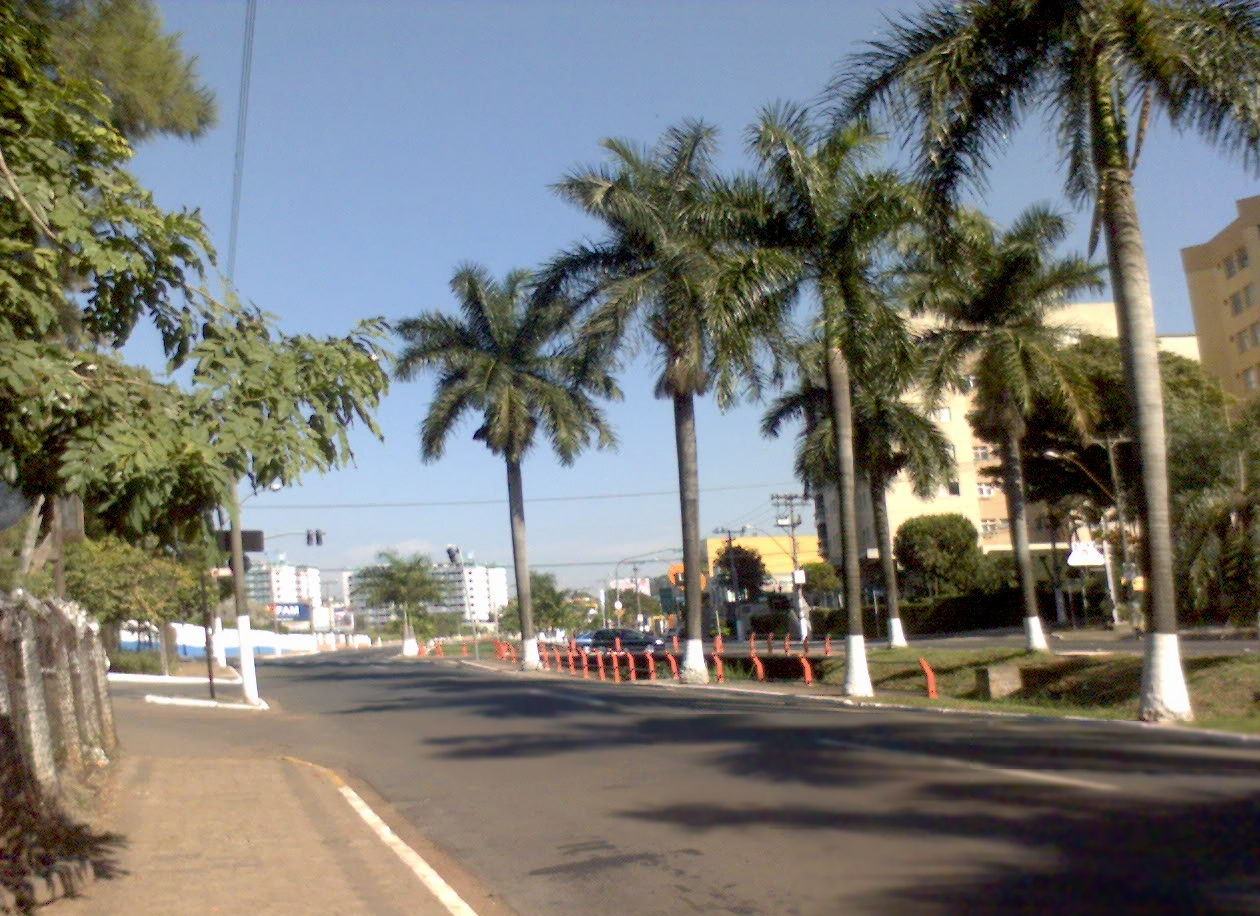 Avenida Brasil, Americana-SP, Brasil